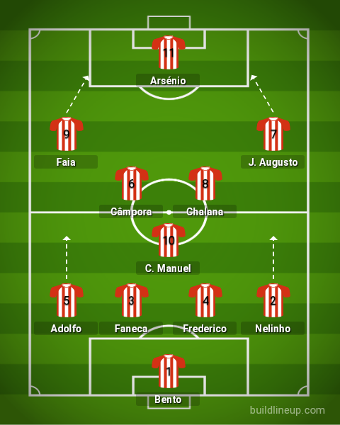 Possível melhor 11 de todos os tempos de jogadores que passaram pelo FC Barreirense.